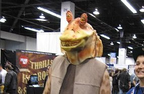 Cropped version of Jar Jar